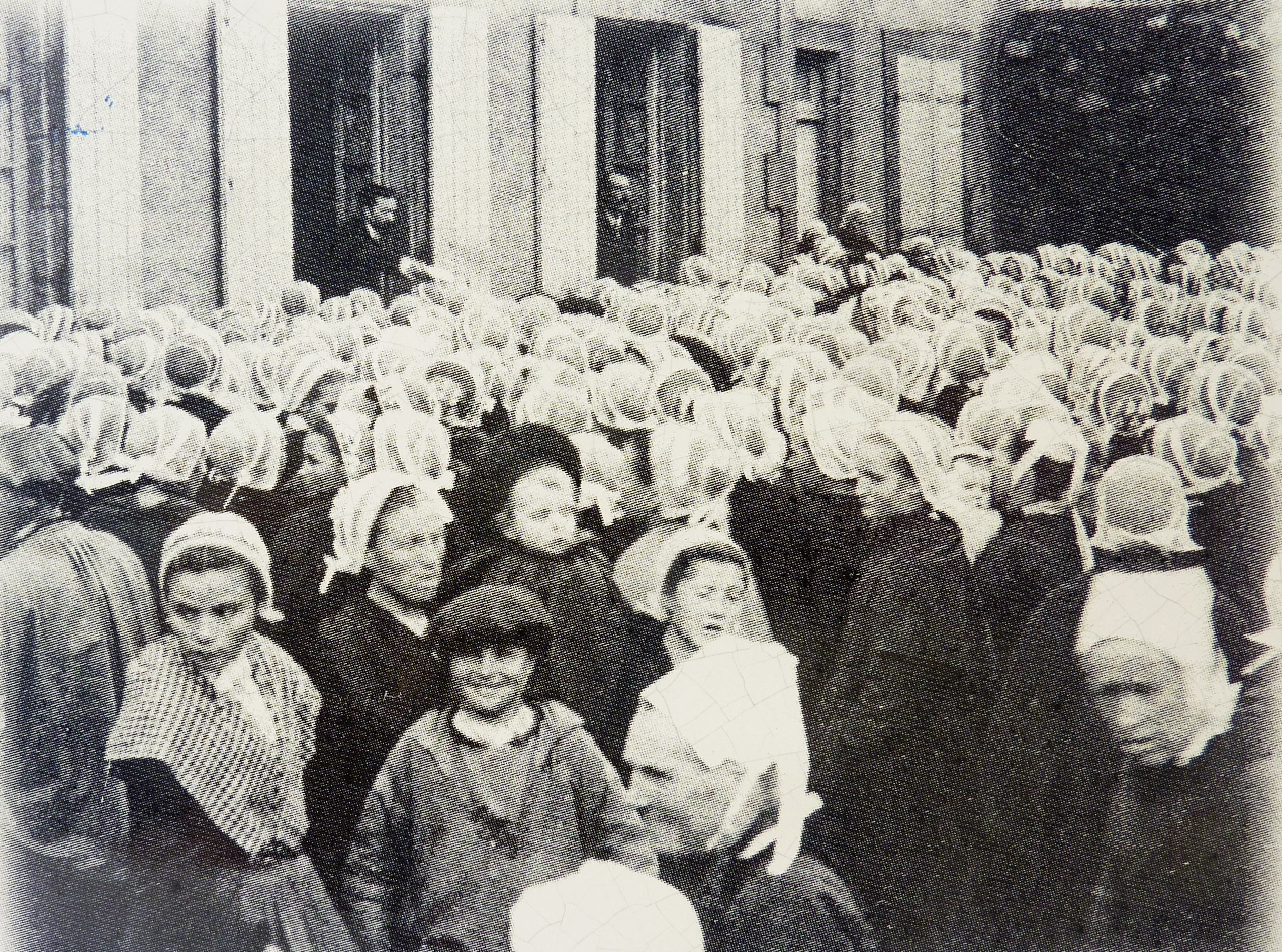 Douarnenez : distribution de vivres à la mairie lors de la crise sardinière (panneau d'information touristique à Douarnenez). Femmes en coiffes de penn-sardin.